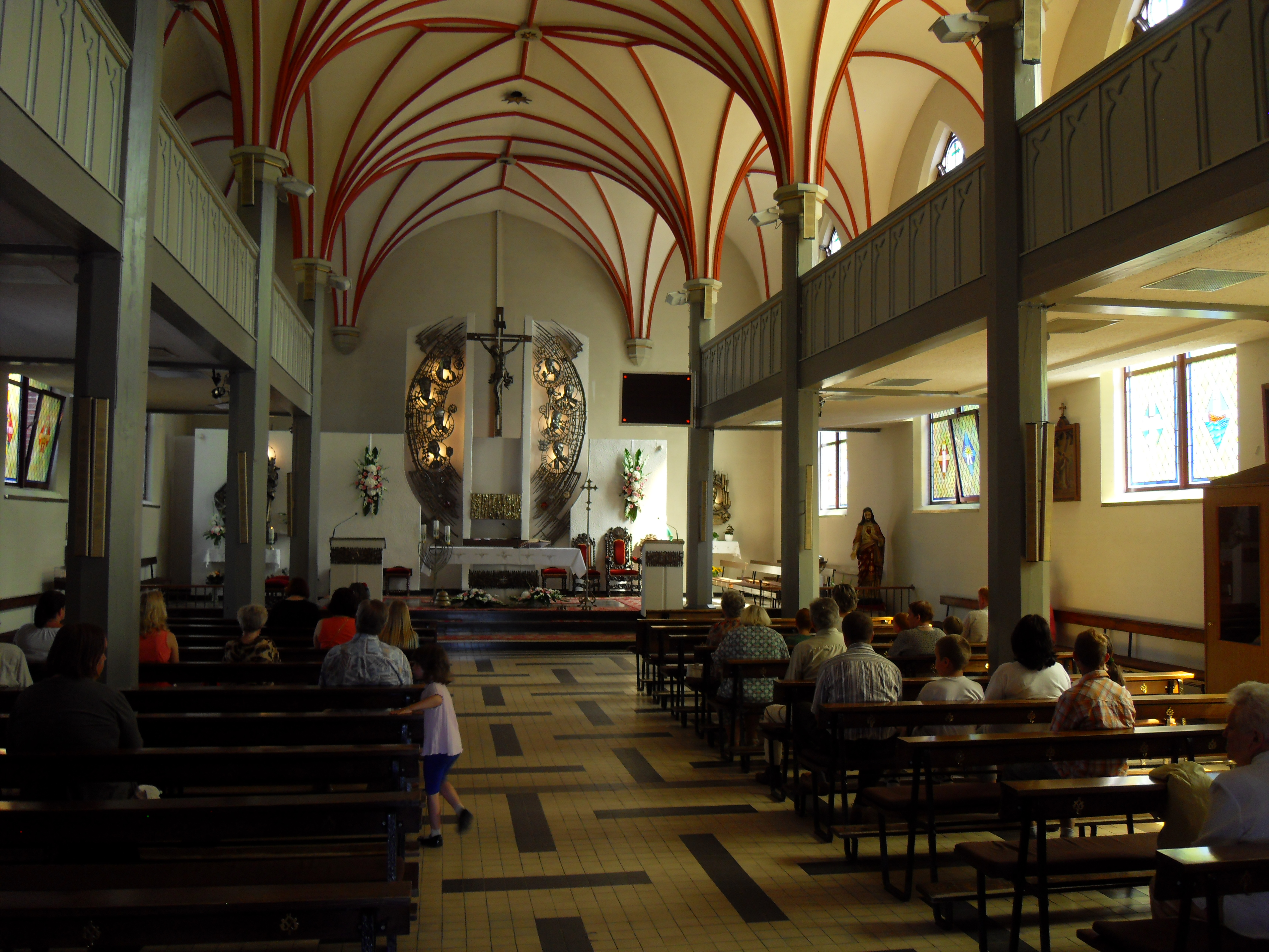 Gdańsk Orunia, ul. Gościnna 15 - dawny kościół ewangelicki św. Jerzego, obecnie rzymskokatolicki parafialny p.w. św. Jana Bosko, 1820-1823